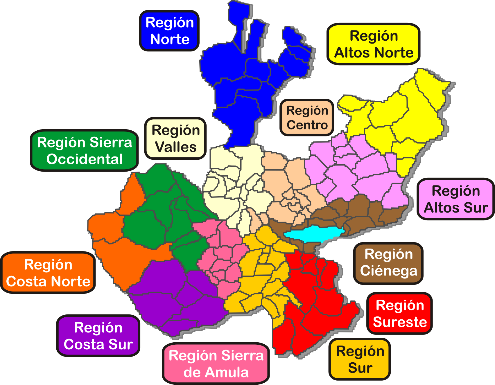 Mapa de las Regiones del Estado de Jalisco.